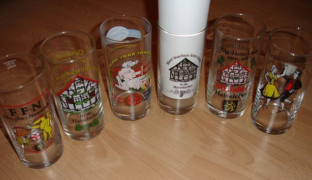 gängige Schoppenmotive in den Haiselscher von links nach rechts: 1. Schoppen der Feucht-Fröhlichen-Neustadter, 2. Gemeinschaftschoppen der Wirte von 2001, 3. Jubiläumschoppen von Metzgerei Hauk, 4. Gemeinschaftsschoppen von 2000, 5. Jubiläumsschoppen 40 Jahre Haiselcher, 6. Schoppen der Trachtengruppe Neustadt an der Weinstrasse